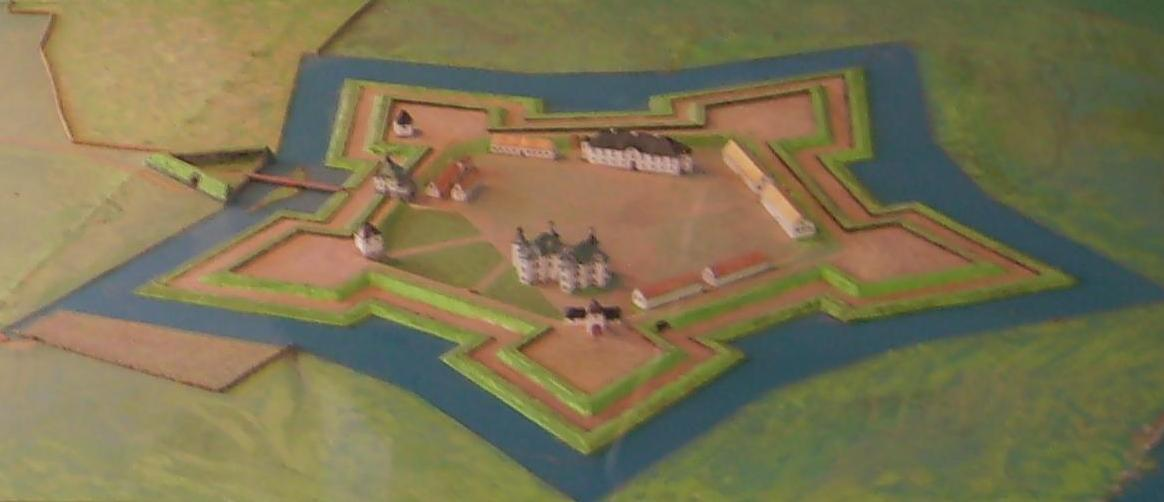 Bilden är fotograferad av Harri Blomberg. Photo by Harri Blomberg.